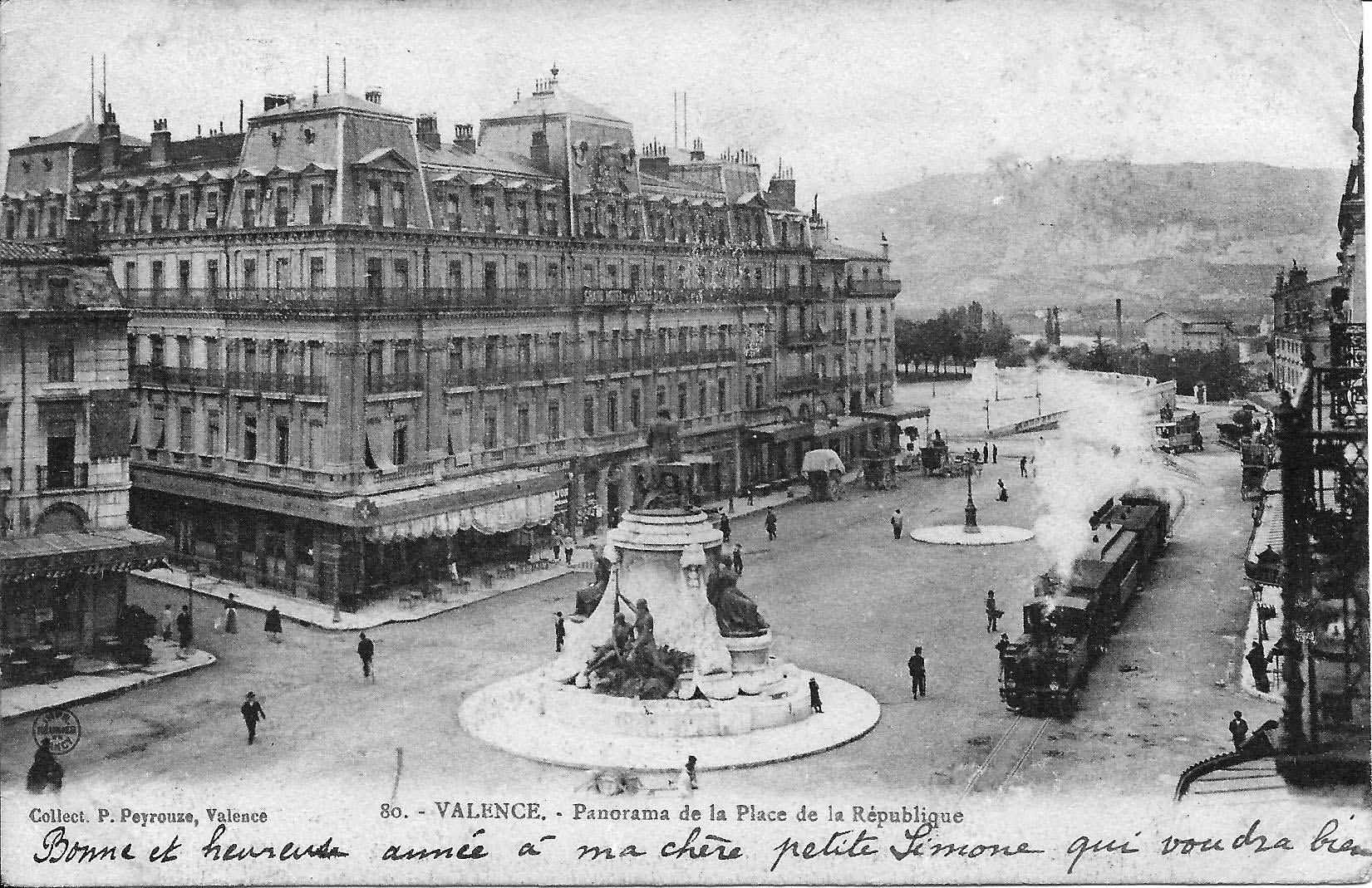 Train à vapeur sur la place de la République à Valence. Alors que le tramway électrique était encore en projet, les tramways à vapeur de l'Ardèche traversaient déjà le centre de Valence.